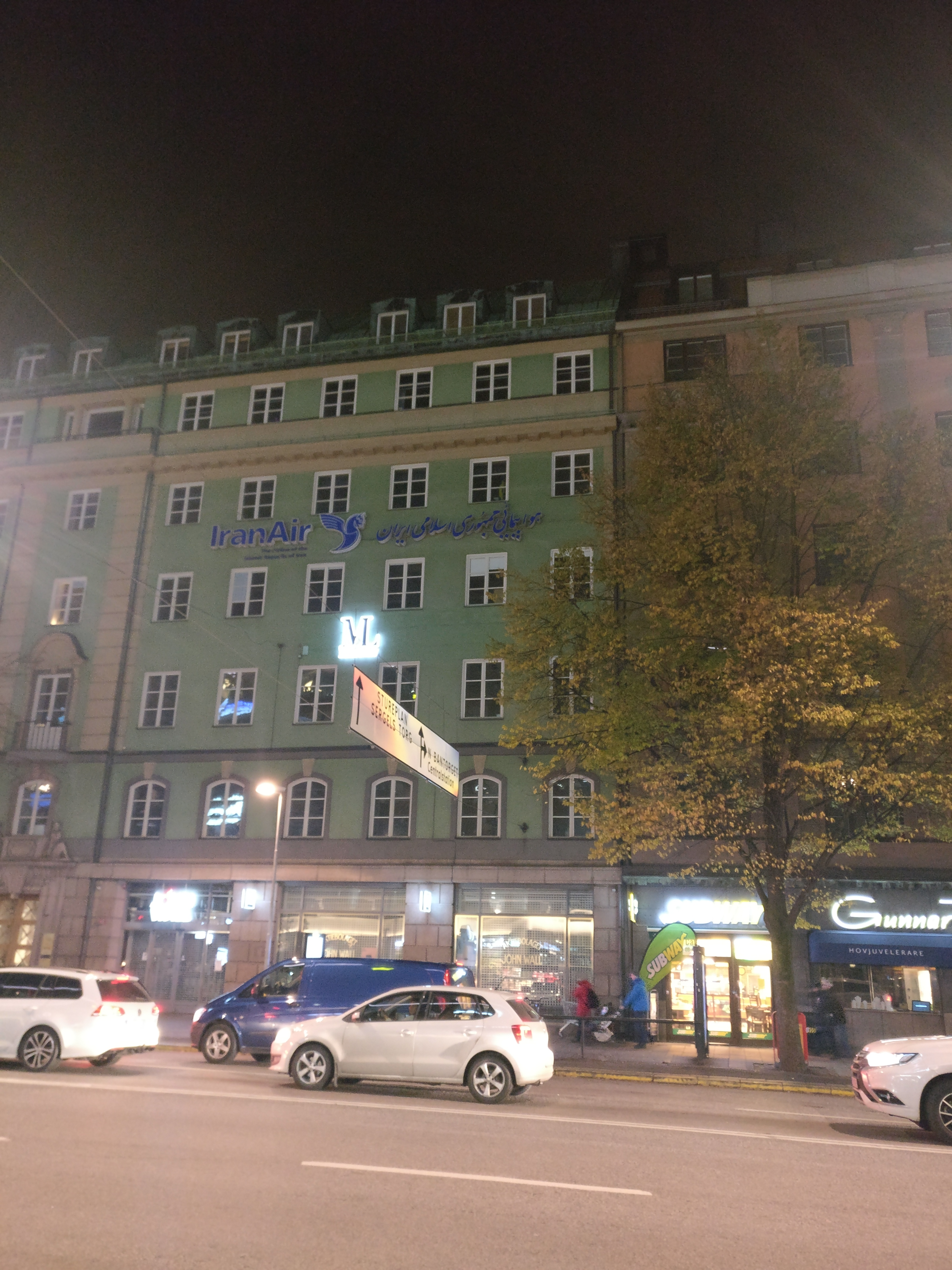 Iran Air Stockholm